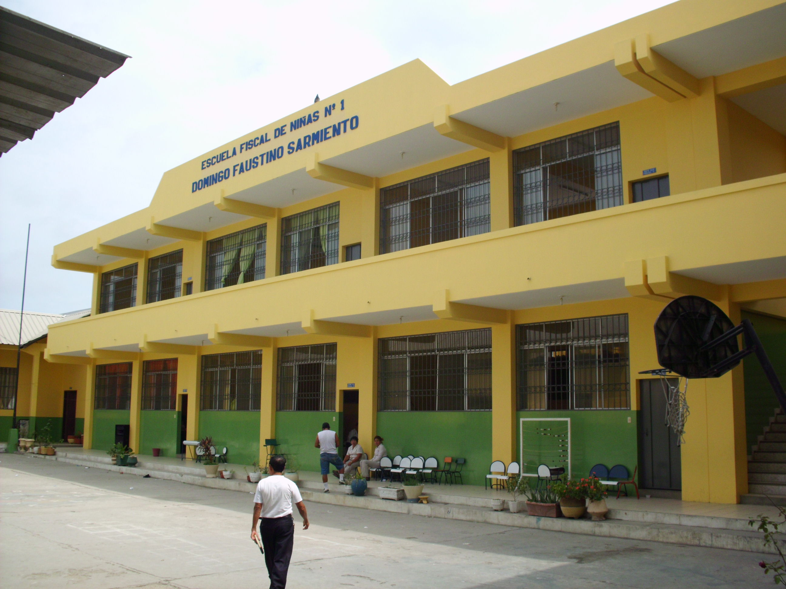 Escuela Fiscal Nº 1 Domingo Faustino Sarmiento en Libertad, Ecuador